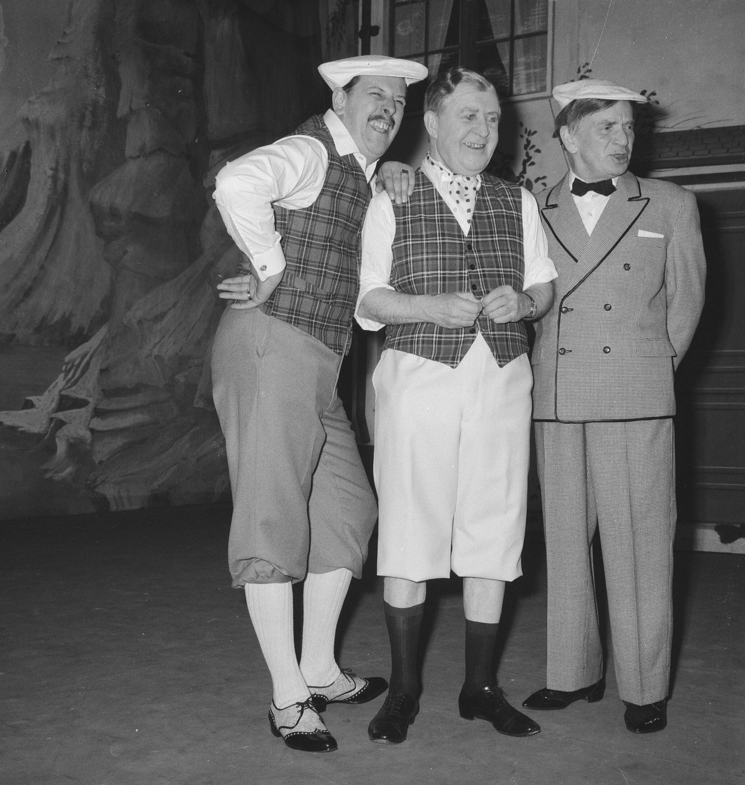 Collectie / Archief : Fotocollectie Anefo Reportage / Serie : [ onbekend ] Beschrijving : Musical "No No Nanette" in Carré, v.l.n.r. Joop Doderer, Johan Kaart en Sylvain Poons Datum : 19 februari 1965 Locatie : Amsterdam, Noord-Holland Trefwoorden : acteurs, artiesten, musicals Persoonsnaam : Doderer, Joop, Kaart, Johan, Poons, Sylvain Fotograaf : Nijs, Jac. de / Anefo Auteursrechthebbende : Nationaal Archief Materiaalsoort : Negatief (zwart/wit) Nummer archiefinventaris : bekijk toegang 2.24.01.03 Bestanddeelnummer : 917-4483